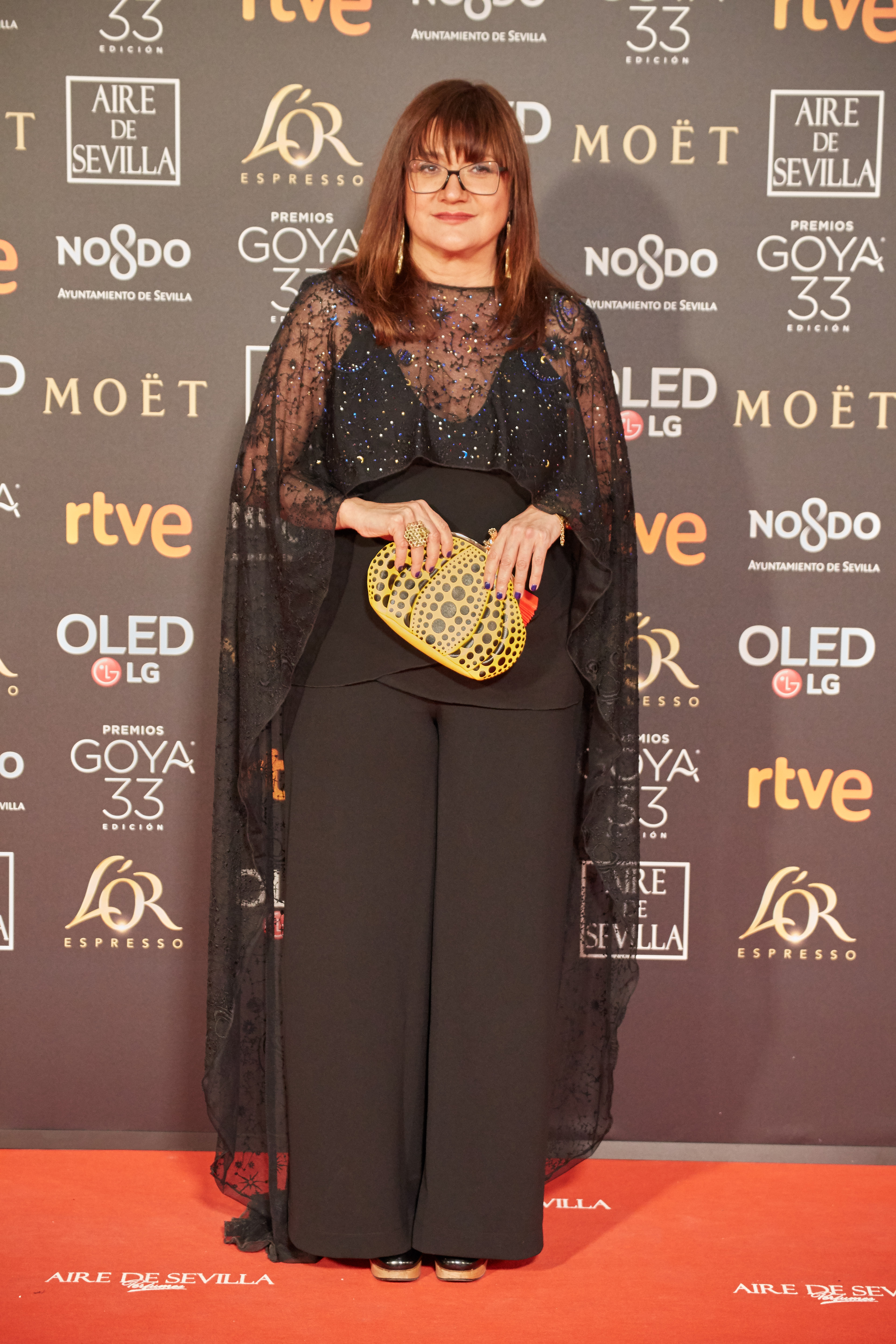 Isabel Coixet en la alfombra roja de los Premios Goya celebrados en Sevilla en Febrero 2019